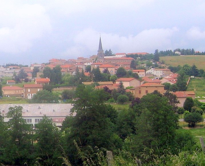 Vue générale